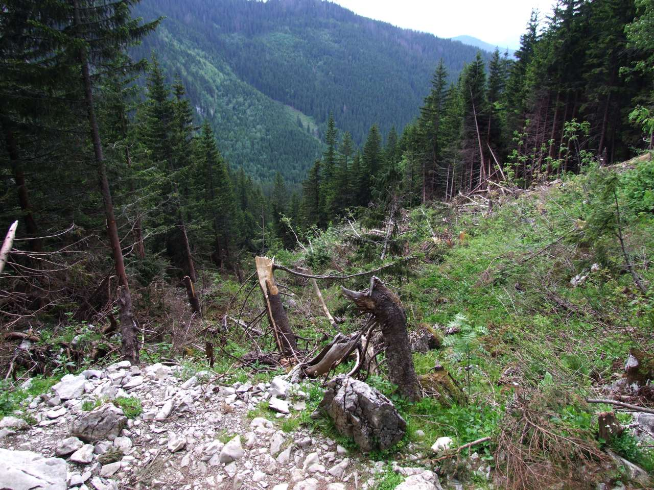 Żleb Wodniściak - dolna część widziana ze ścieżki turystycznej z Przysłopu Mietusiego na Małołączniak